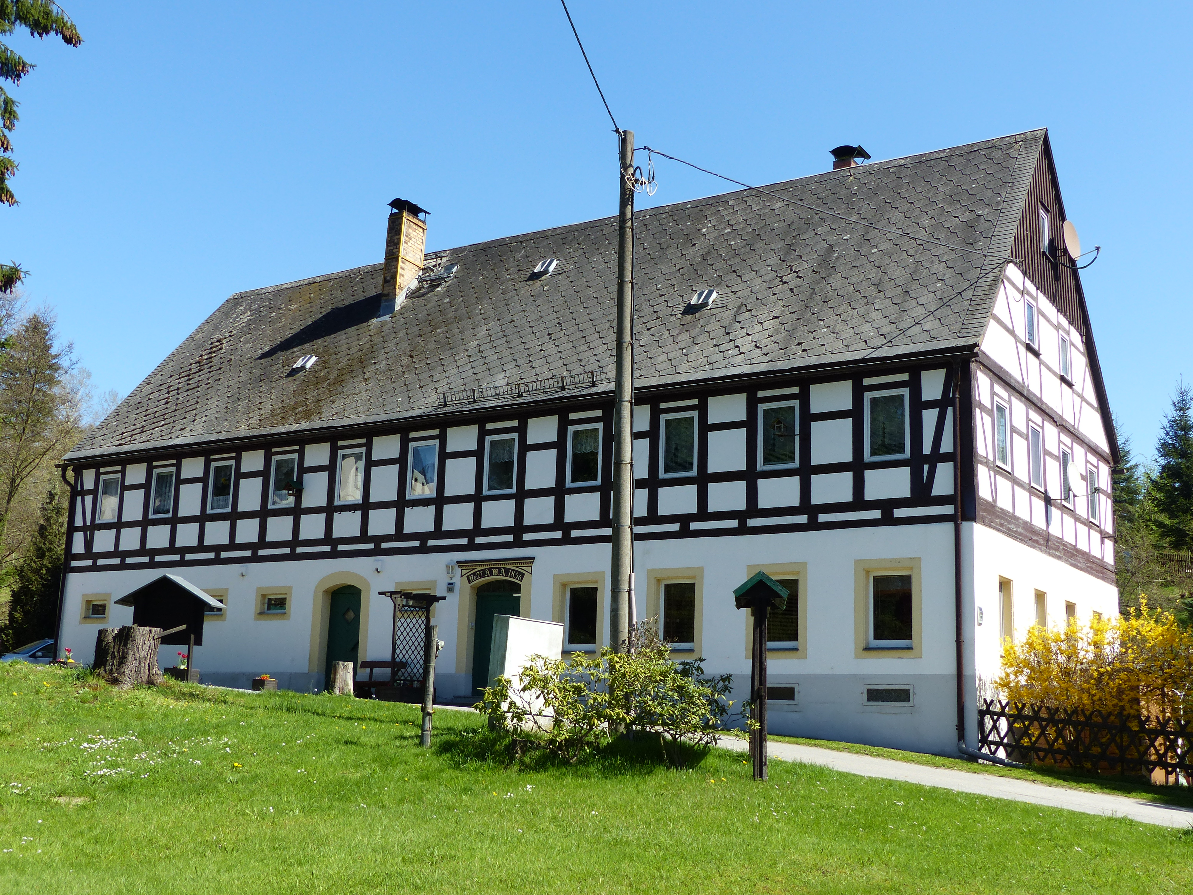 Denkmalgeschütztes Fachwerkhaus, Hohnsteiner Straße 12, Hainersdorf (Sebnitz)